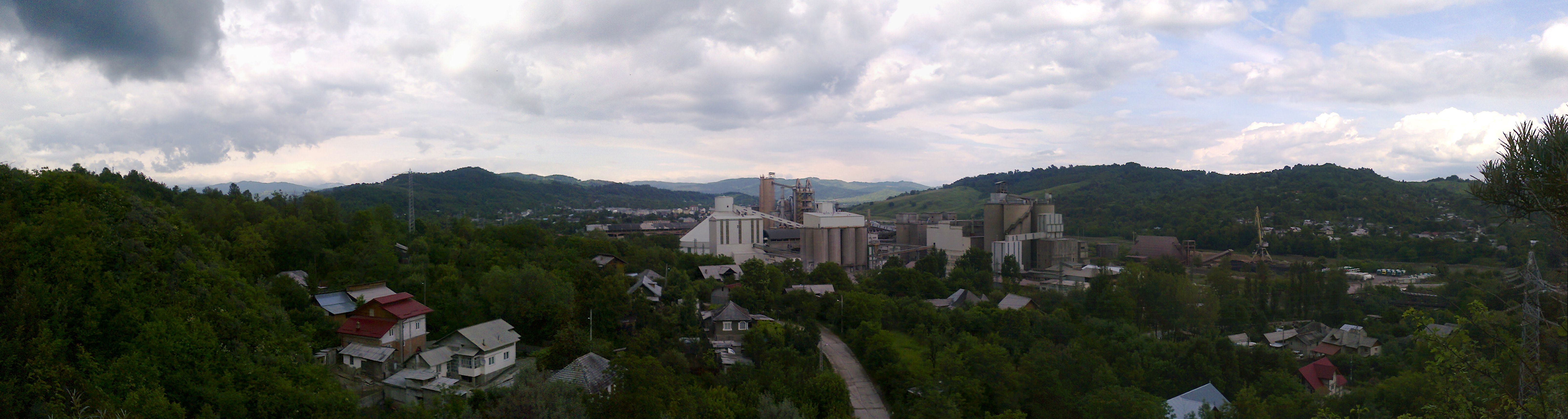 Imagine panoramică a Fabricii de Ciment văzută de pe vârful, numit La Stâlp, aflat în sudul Fieniului pe coama de deal numită Sfoara Scurtă al cărui capăt sfârşeşte în curba drumului judeţean, la capătul podului peste Ialomicioara.